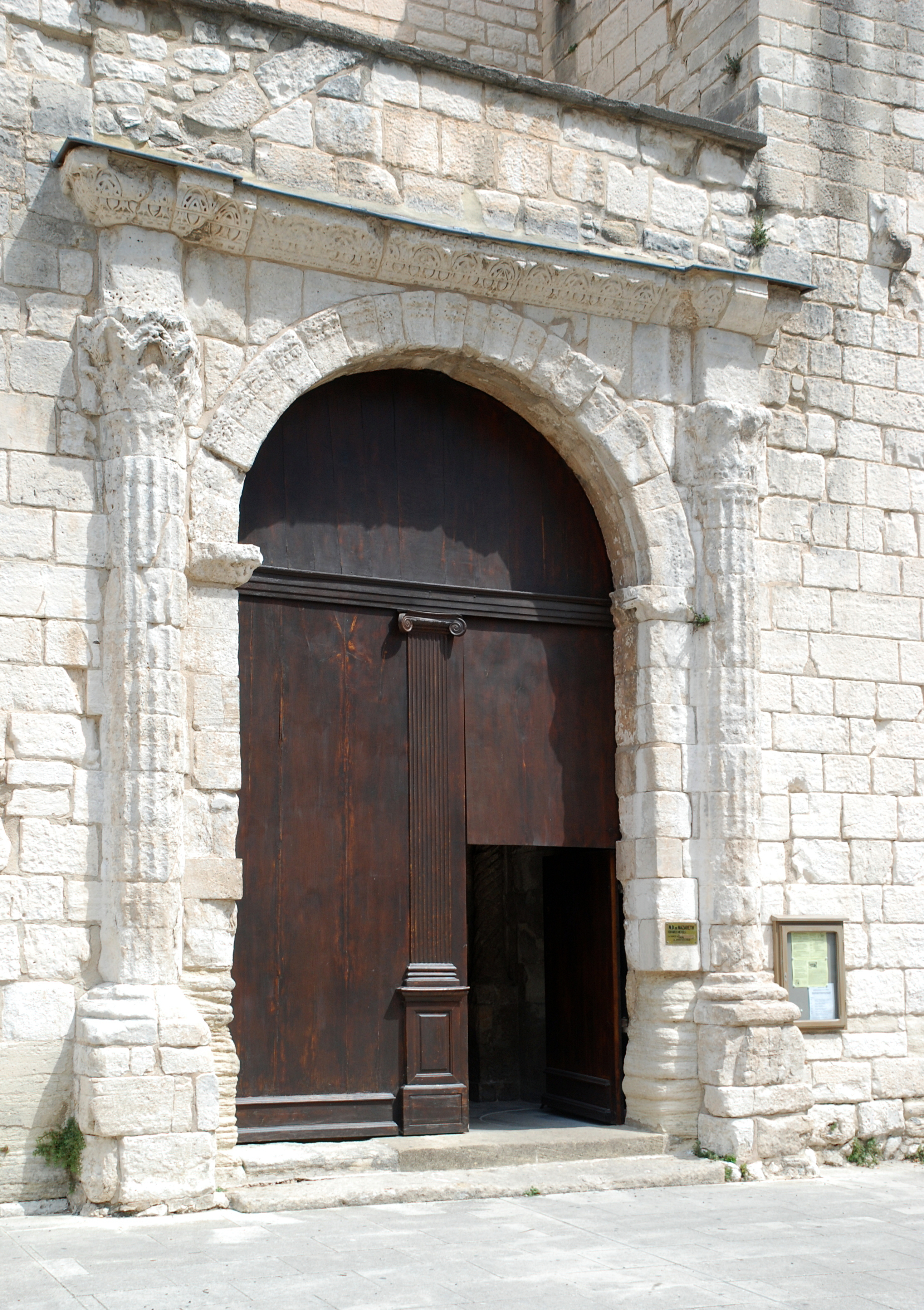 France - Provence - Vaucluse - Pernes-les-Fontaines - Notre-Dame-de-Nazareth.